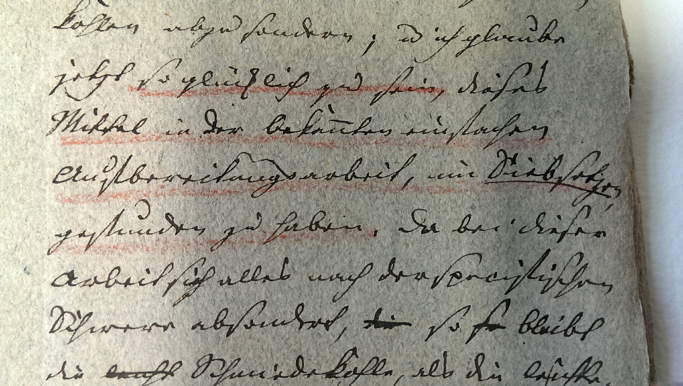 Brief Faktor Lindig an Bergrat von Oppel zur Erfindung der Kohlenwäsche 1810. Aus Zechenprotokoll für die Königl. Steinkohlenwerke im Plauenschen Grunde auf das Jahr 1810